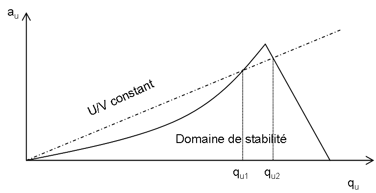 Diagramme de stabilité selon les équations de Mathieu, pour un ion dans un analyseur quadripolaire, en spectrométrie de masse